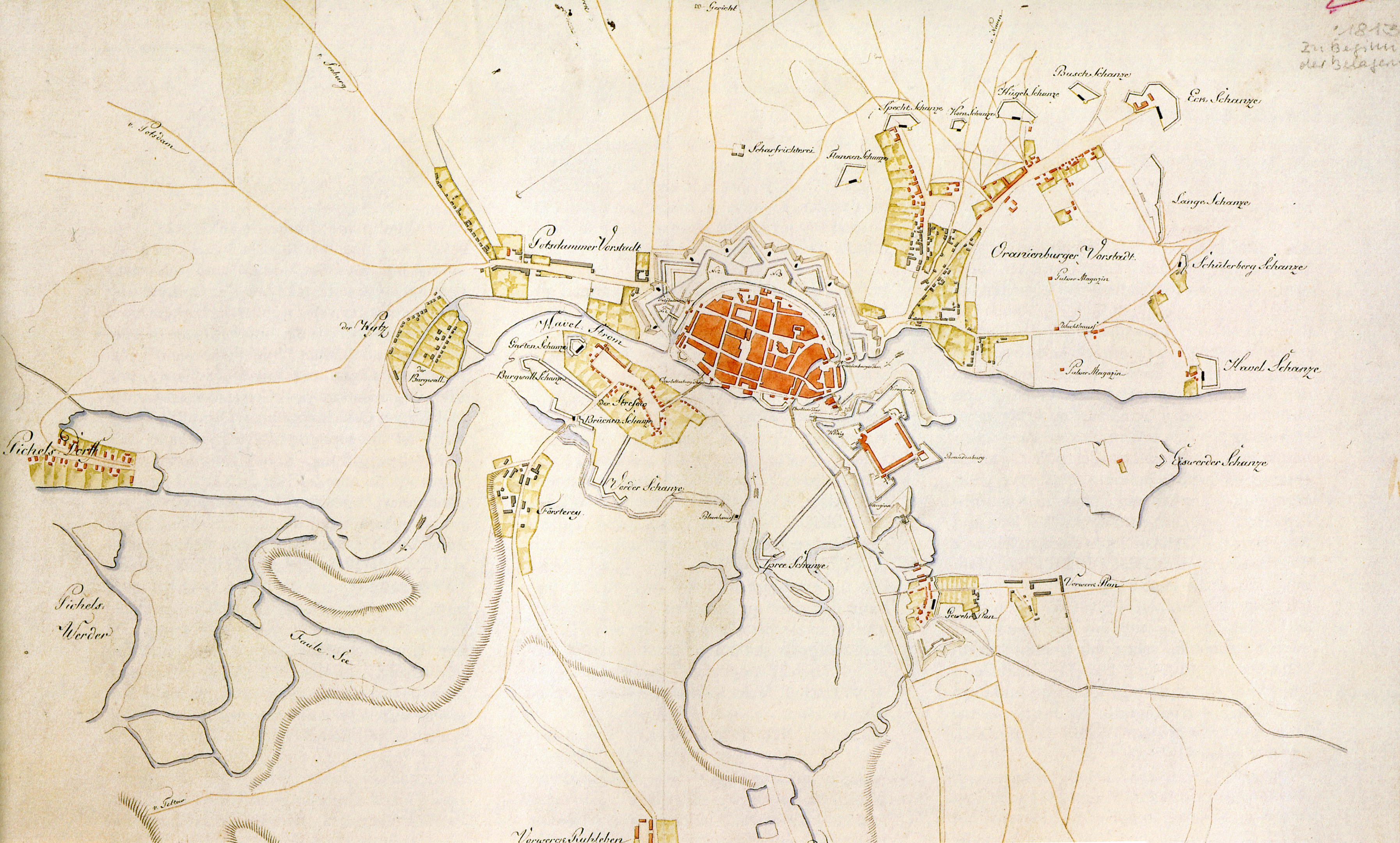 Situations Plan von der Stadt und Festung Spandow nebst dessen Vorstädten und dem Verschanzten Lager Maßstab: etwa 1:30.000 Orientierung: West Kolorierte Handzeichnung